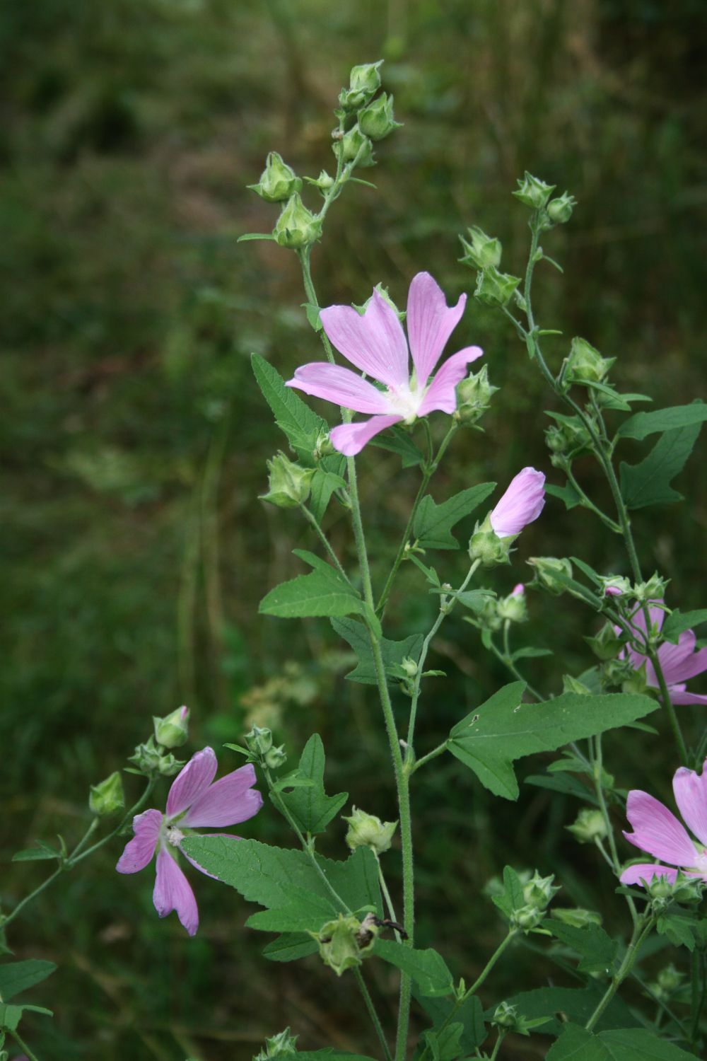 Thüringer Strauchpappel (Lavatera thuringiaca), Malvengewächse (Malvaceae) - Österreich/Austria/Autriche: Niederösterreich, Eichkogel S Mödling